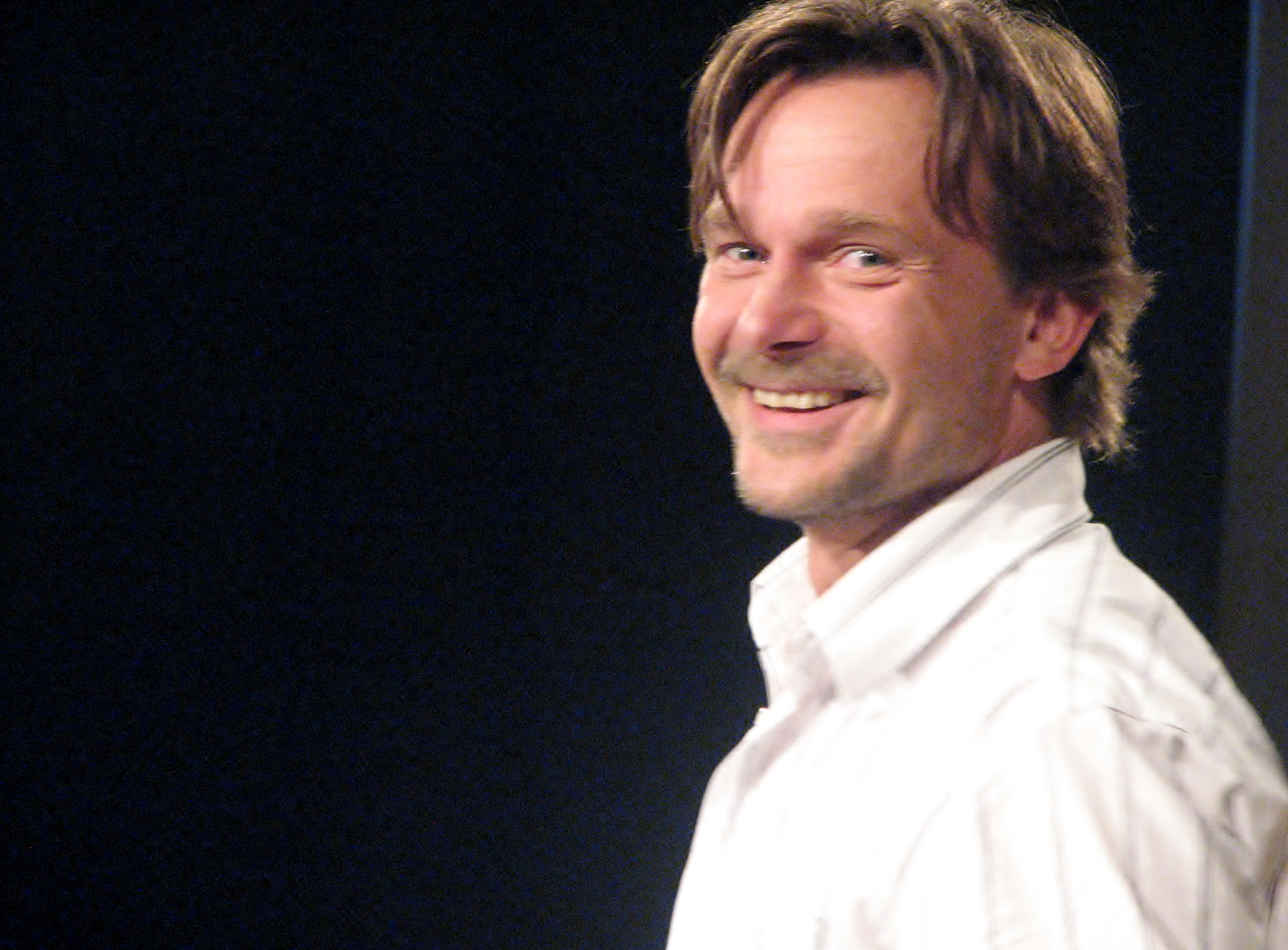 Indrek Sammul Tallinna Kirjanike Maja laval festivali III Dovlatovi Päevad Tallinnas raames